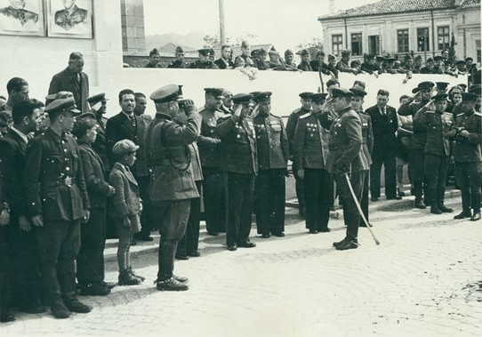 Посрещането на Трета пехотна балканска дивизия в Сливен.